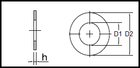 DIN 988